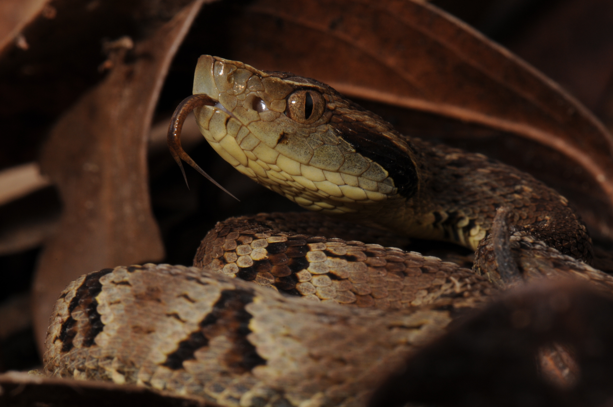 Jararaca - Bothrops jararaca - Espécie mediana encontrada da Bahia ao Rio Grande do Sul e de importância médica.